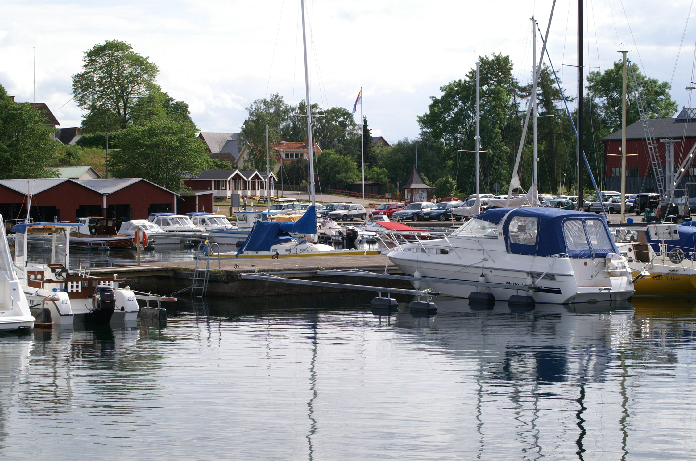 Hamnen i Hästholmen.